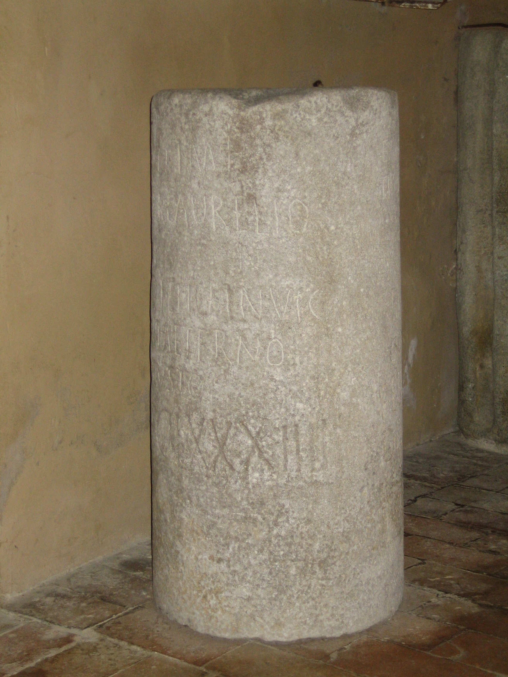 Il miliario di Corinaldo, conservato presso la chiesa di Madonna del Piano - (CIL XI, 6631 = SupIt-18-S, 00002 pp. 354-357)